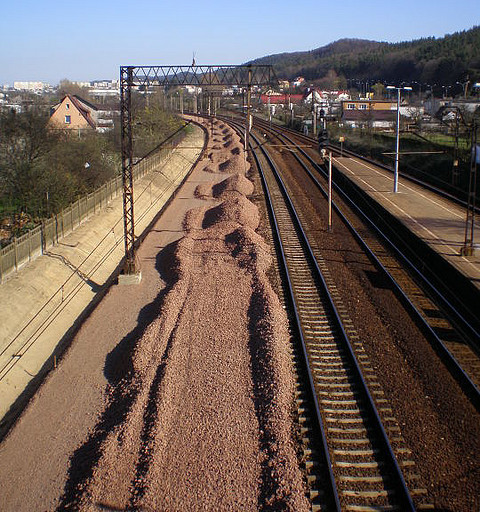 2007.04.16 - 021 Rumia Janowo